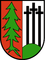 Mellau, Vorarlberg: In von Rot und Weiß gespaltenem Schild eine natürliche, entwurzelte Tanne im roten Feld und drei schwarze Kreuze, das mittlere die beiden anderen überhöhend, auf grünem Hügel im weißen Feld. (Verleihung: 12. Dezember 1962)